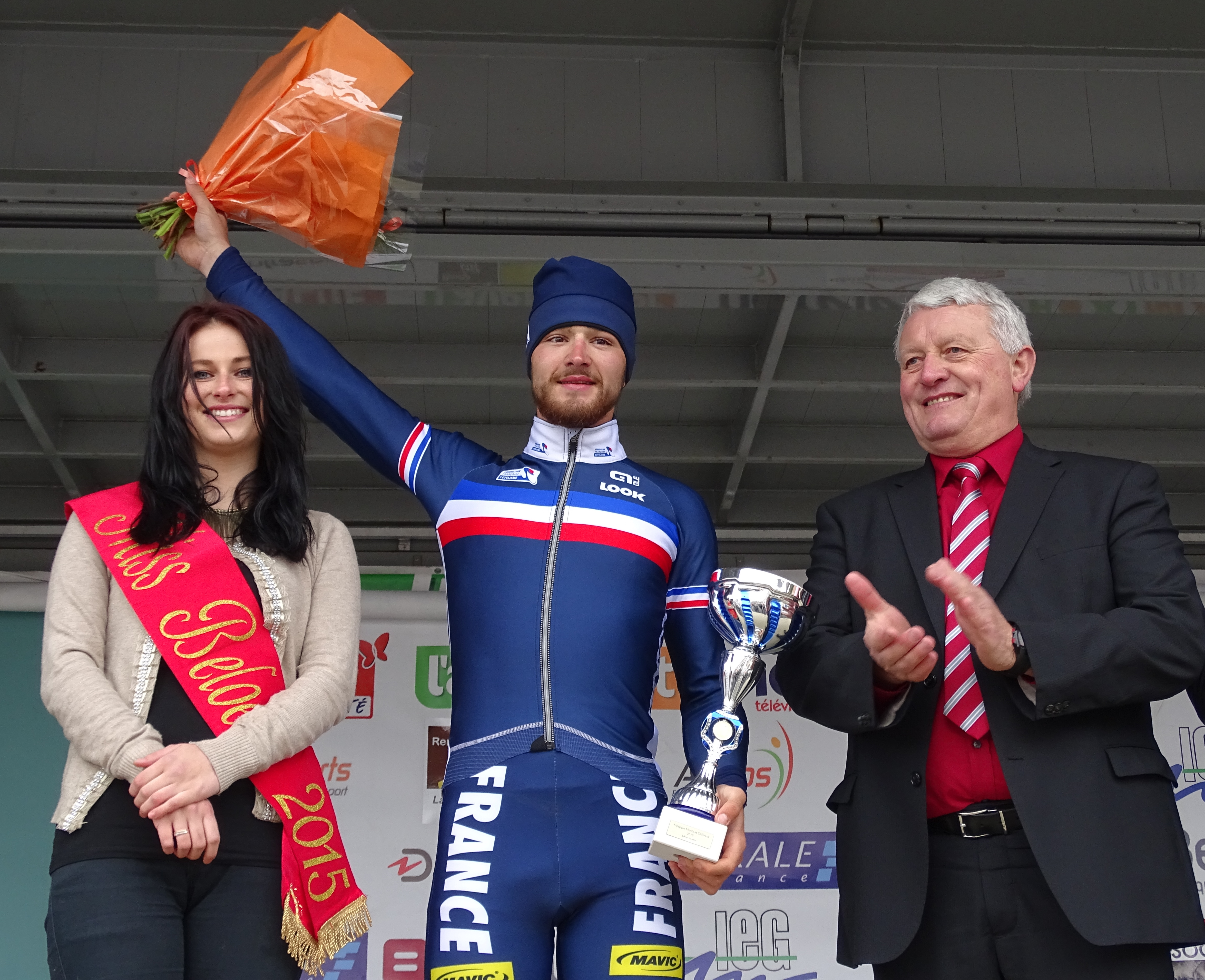 Triptyque des Monts et Châteaux 2015 Depicted person: Marc Fournier Depicted team: Équipe nationale de France espoirs